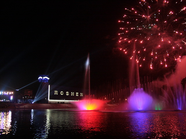 Фото Юрій Басюк